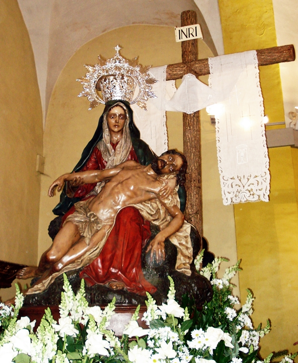 Nuestra Señora de la Piedad. Luis Salvador Carmona, 1750 y Antonio Cruz Collado, 1949. Real cofradía de Mineva y Vera Cruz. Foto. G. Márquez